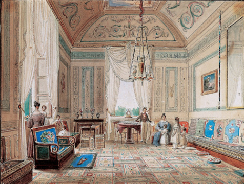 Un salotto di Villa Paolina a Roma con la Principessa Zenaide, i figli e la sorella Charlottelabel QS:Lit,"Un salotto di Villa Paolina a Roma con la Principessa Zenaide, i figli e la sorella Charlotte"